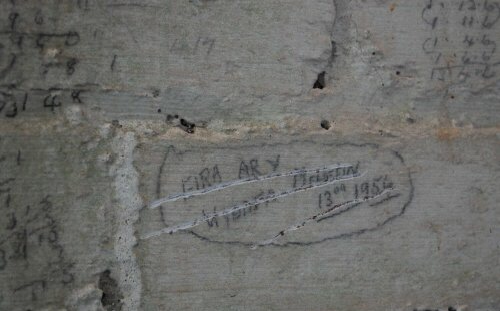 Welsh workplace graffiti, recording unusual weather event